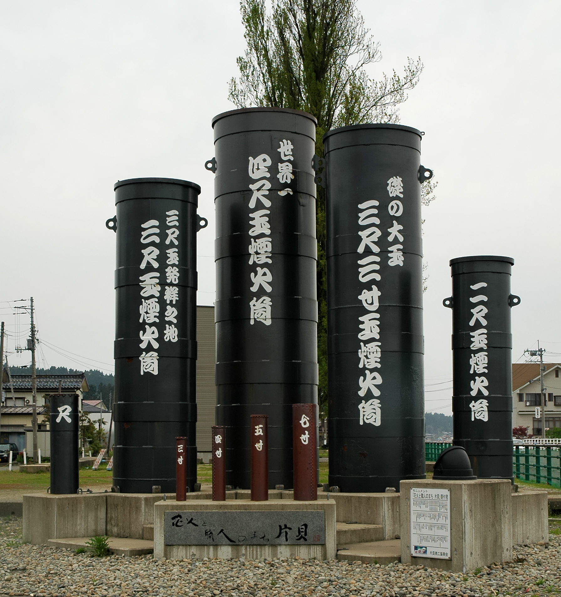 Monument of Fireworks, Katakai Ojiya (新潟県小千谷市片貝の花火打ち上げ筒のモニュメント)